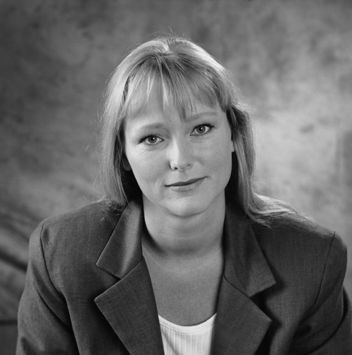 Antoinette Hertsenberg.